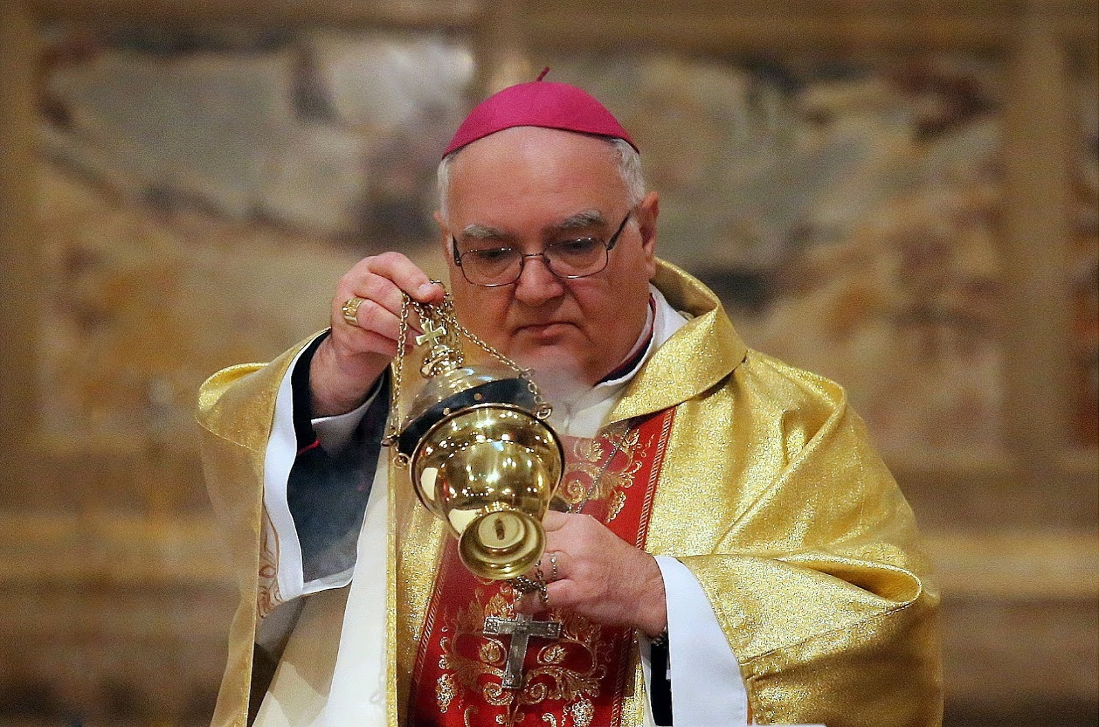 Bottari di Castello, 2014.03.13.